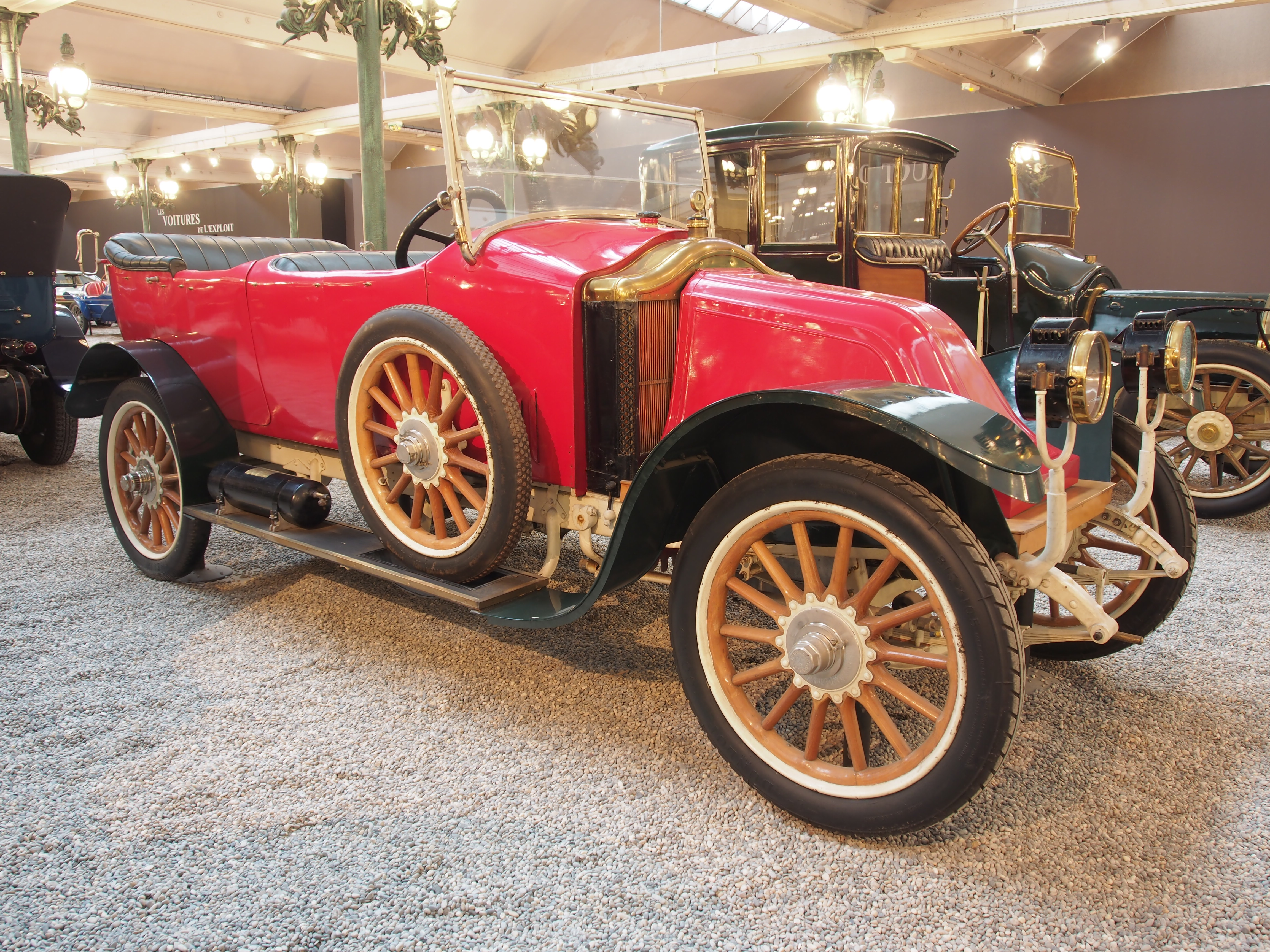 Photographed at the Cité de l’Automobile, Musée national de l’automobile, Collection Schlumpf, Mulhouse, France.